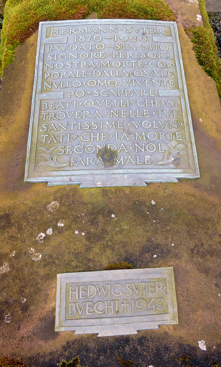 Hermann Suter- Buechi (1870–1926), Organist, Musiklehrer, Dirigent, Komponist, Direktor des Konservatoriums Basel, Grab auf dem Friedhof Hörnli, Riehen, Basel-Stadt